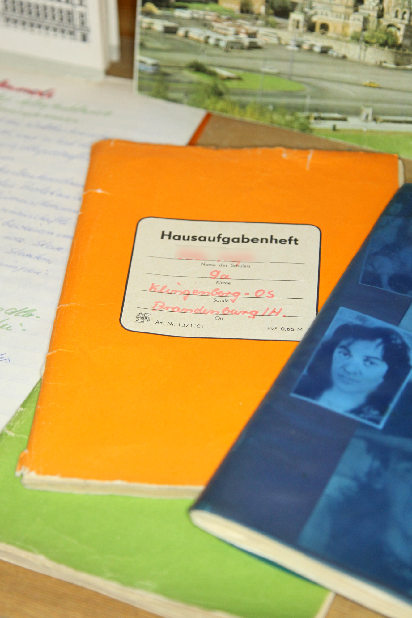 Hausaufgabenheft im DDR-Museum Pirna